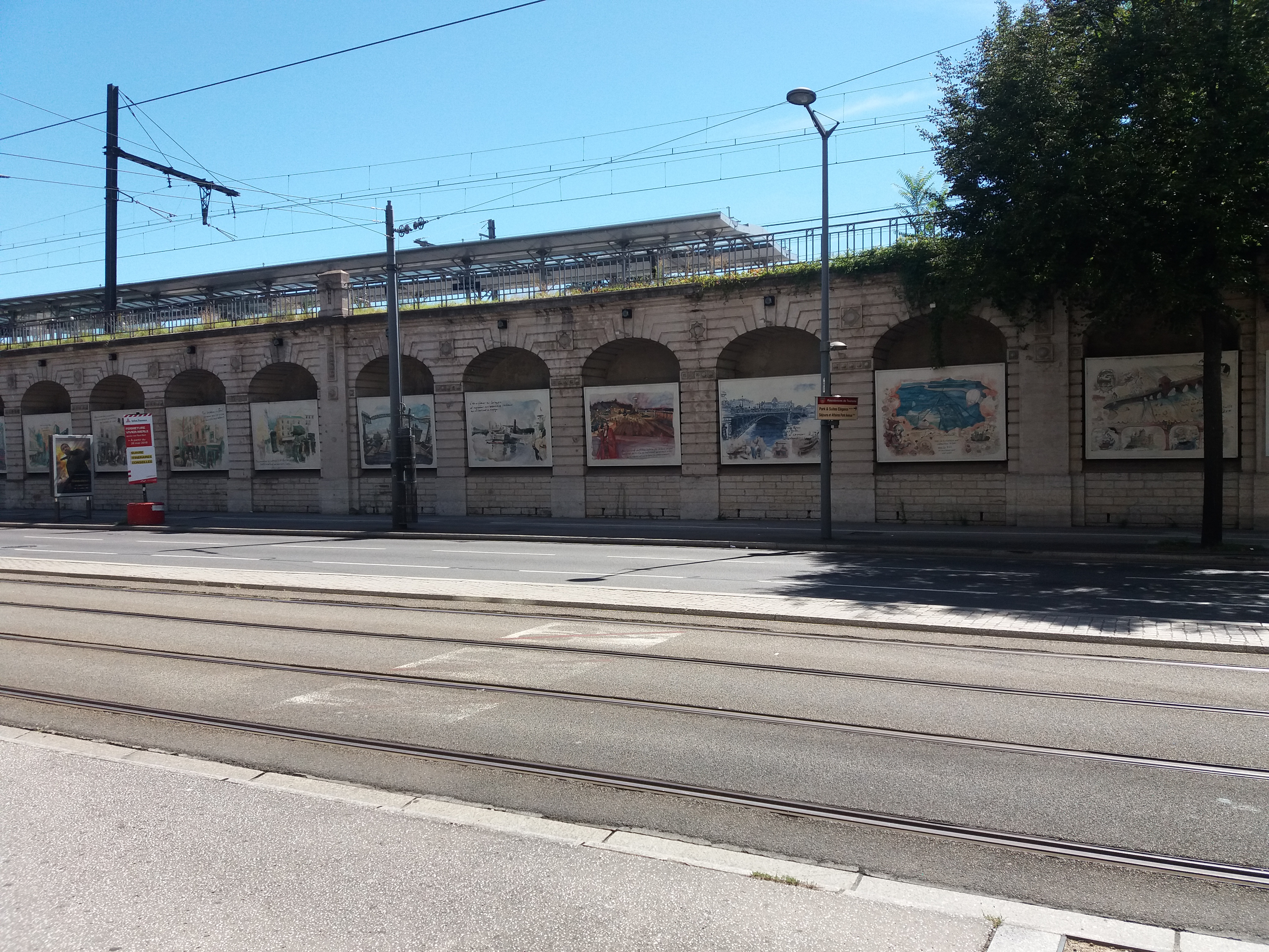 La Fresque du centenaire : côté ouest.